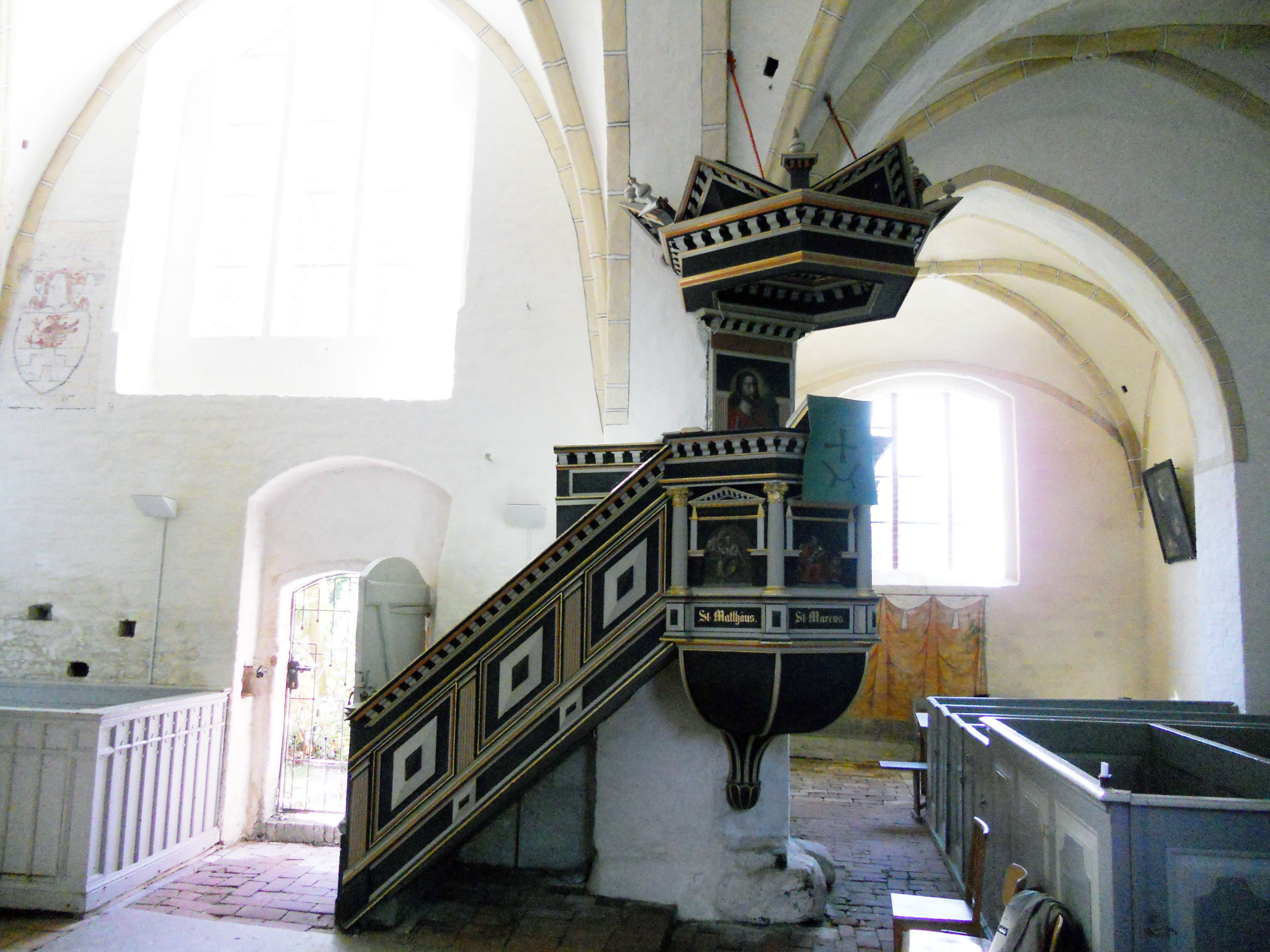 Kanzel der Katharinenkirche in Trent, Rügen